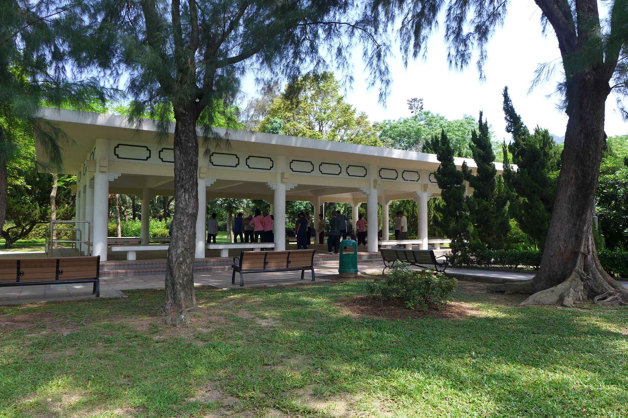 Kowloon Tsai Park Old style Pavillion